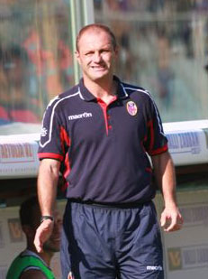 l'allenatore italiano Pierpaolo Bisoli sulla panchina del Bologna.